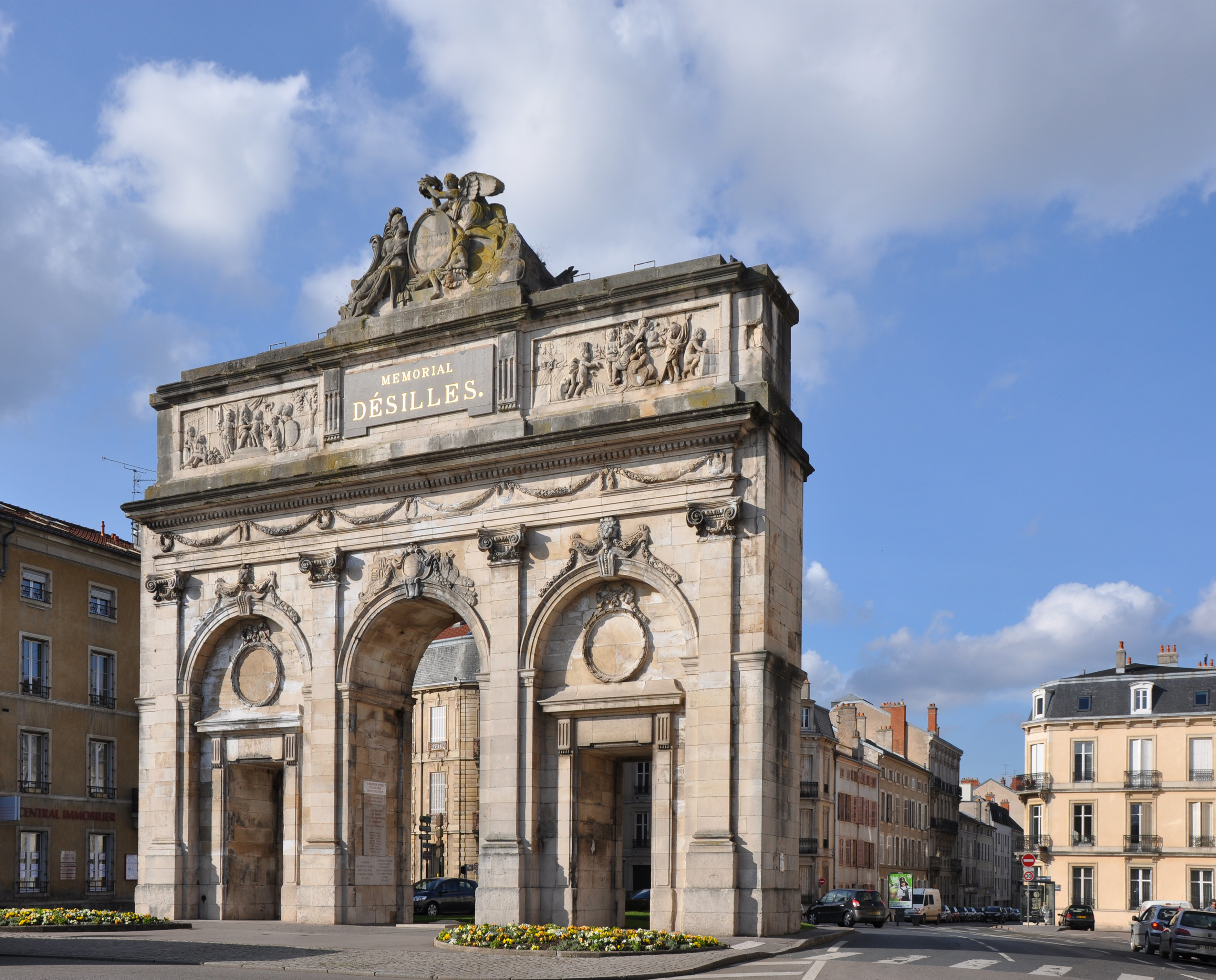 Porte Désilles, Nancy, Lorraine, France